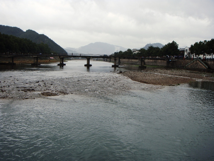 剡江，摄于小洋房前